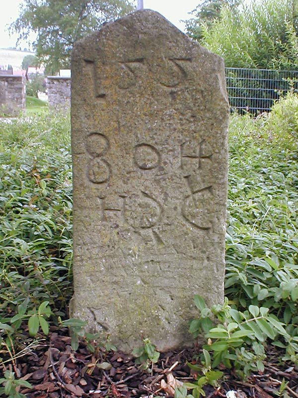 Grenzstein aus Obrigheim-Asbach von 1558. Aufschrift: 155 - 8 Ott - H P C. Der Grenzstein markierte die Grenze zwischen dem zu Obrigheim gehörenden Kurpfälzischem Cameralwald und der Stüber Zent, zu der Asbach zählte. Der Grenzstein weist außerdem auf den 1558 herrschenden Regenten hin: Pfalzgraf Ottheinrich.